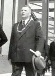 \Chris Matser, Nederlands politicus.